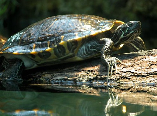 Schmuckschildkröte der Gattung Pseudemys im Kölner Zoo